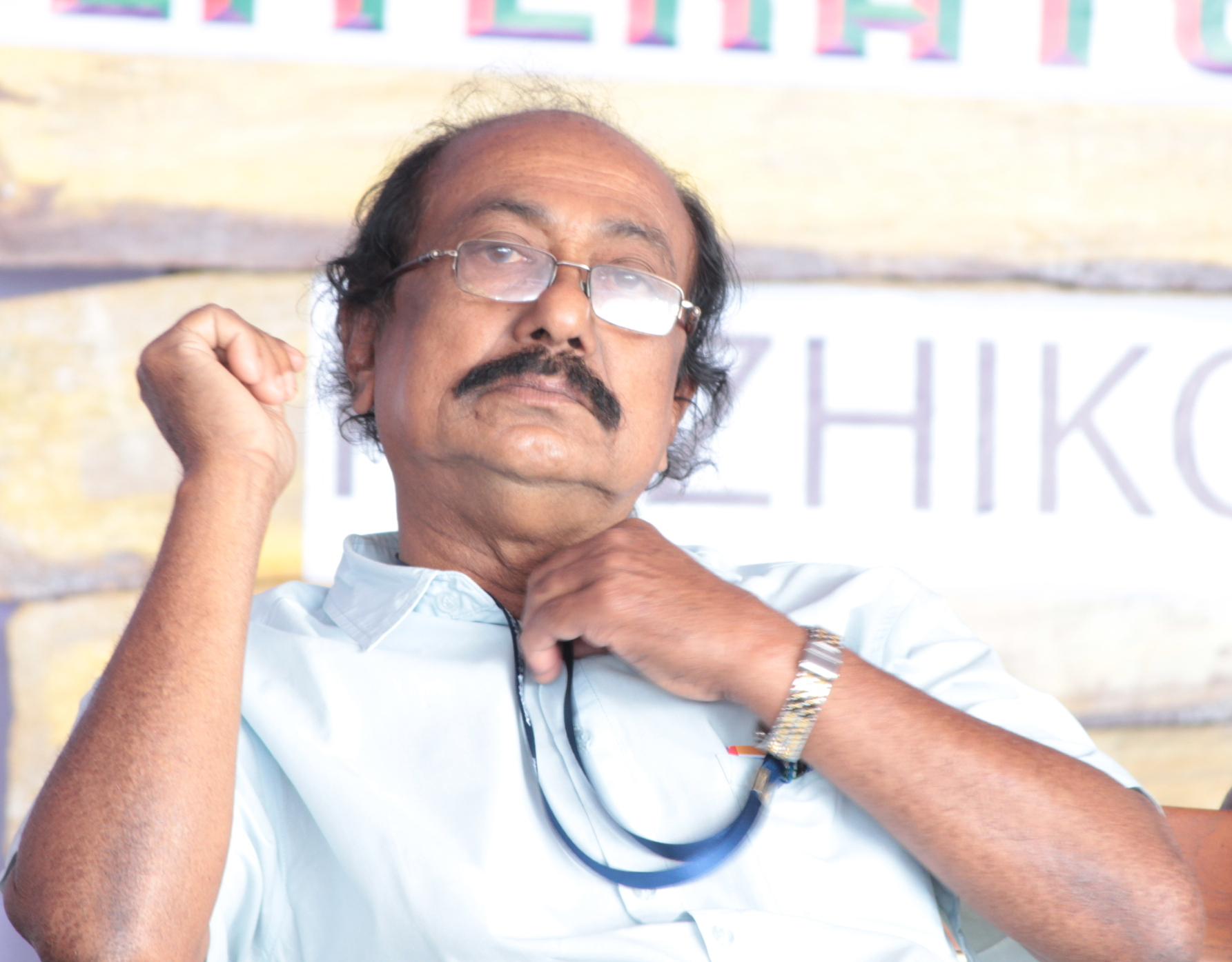 ഭാഷാശാസ്ത്ര വിദഗ്ദ്ധനാണ് നടുവട്ടം ഗോപാലകൃഷ്ണന്‍